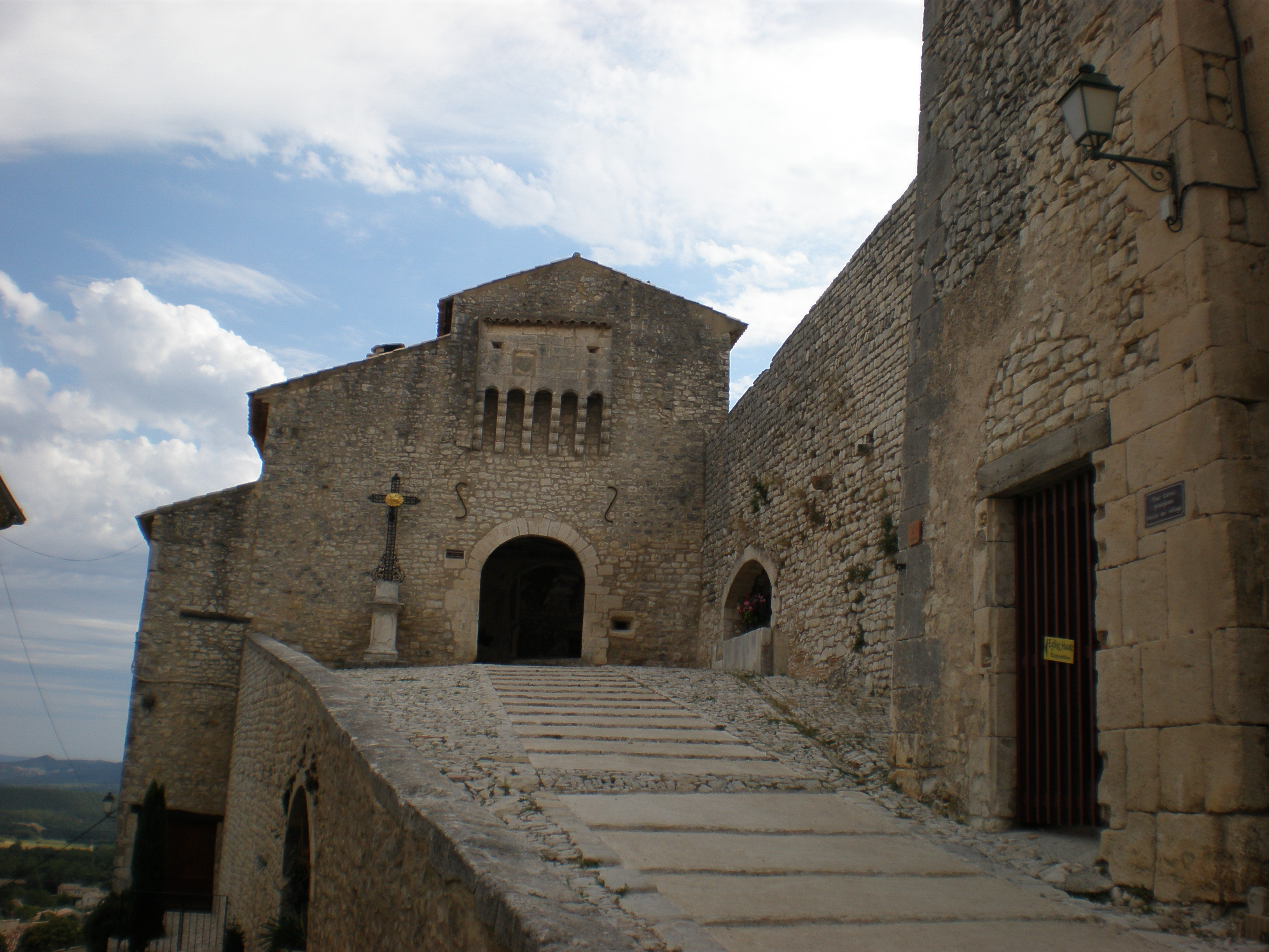 Portail féodal à Banon